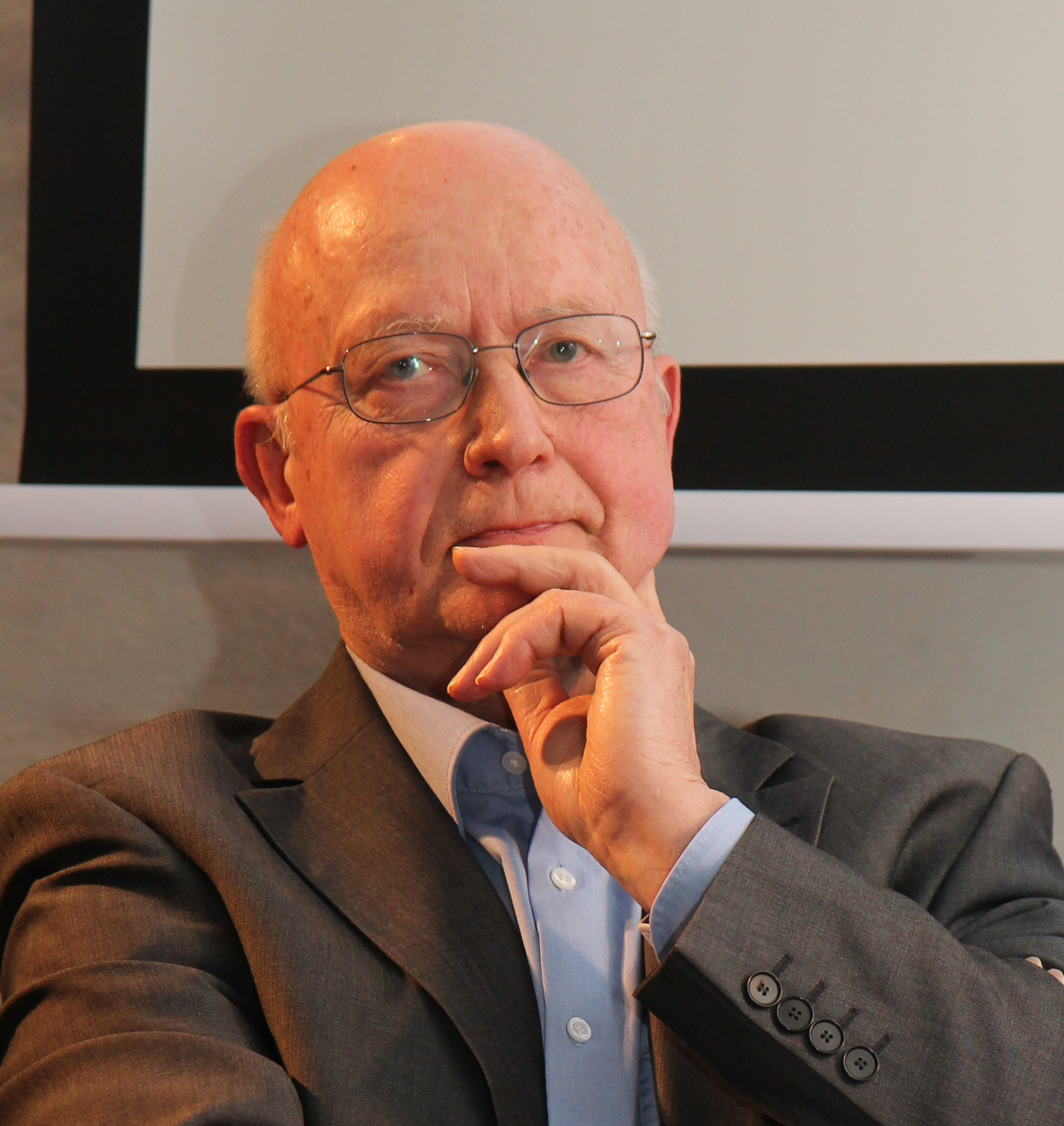 Buchpräsentation "Die deutsche Frage. Olympische Kontroversen in den 1960er Jahren im Deutschen Sport- und Olympiamuseum - Volker Kluge